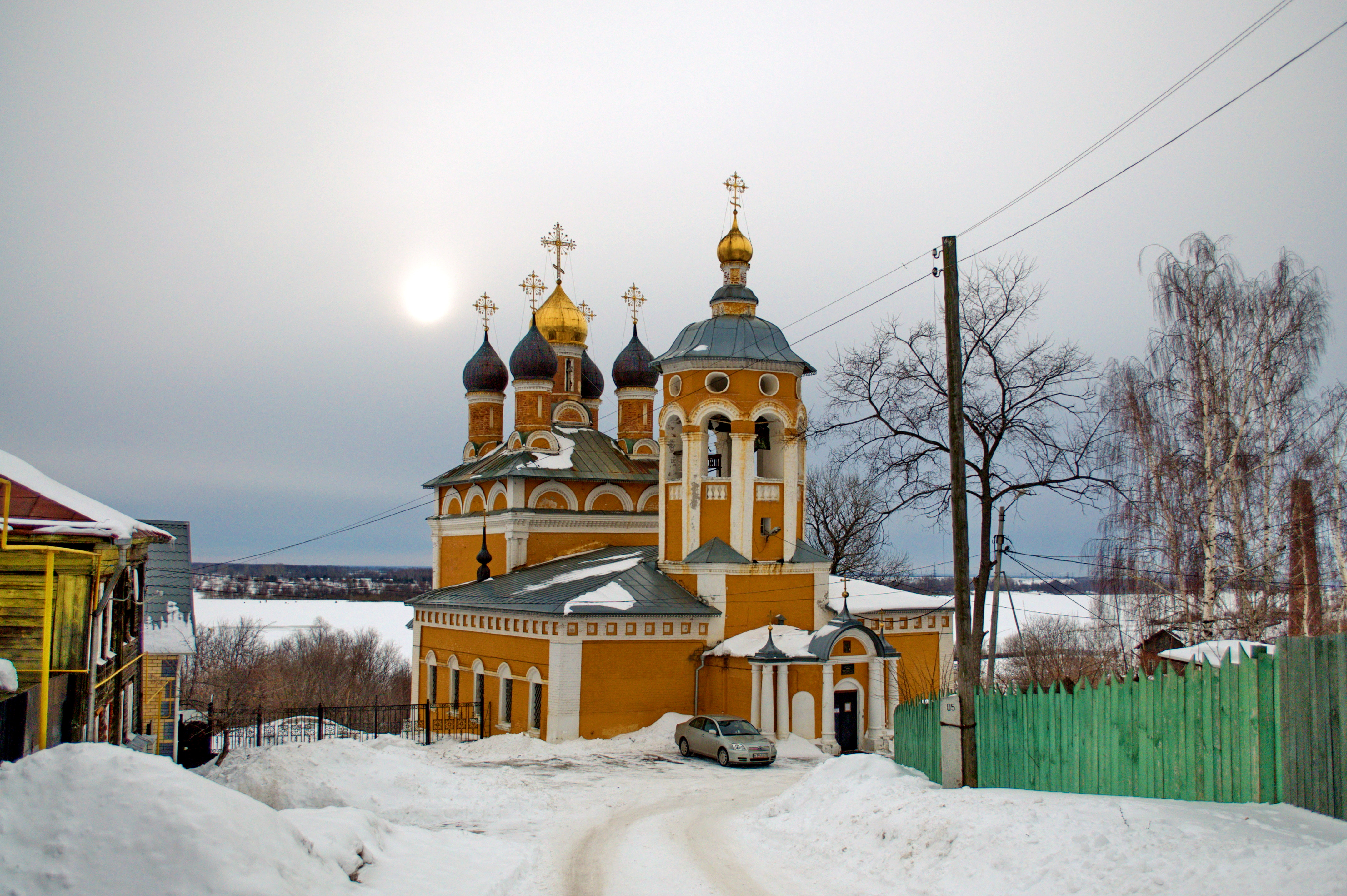 Церковь святителя Николая (церковь Николо-Набережная) (Владимирская область, Муром, Набережная улица (улица Плеханова, 27а))